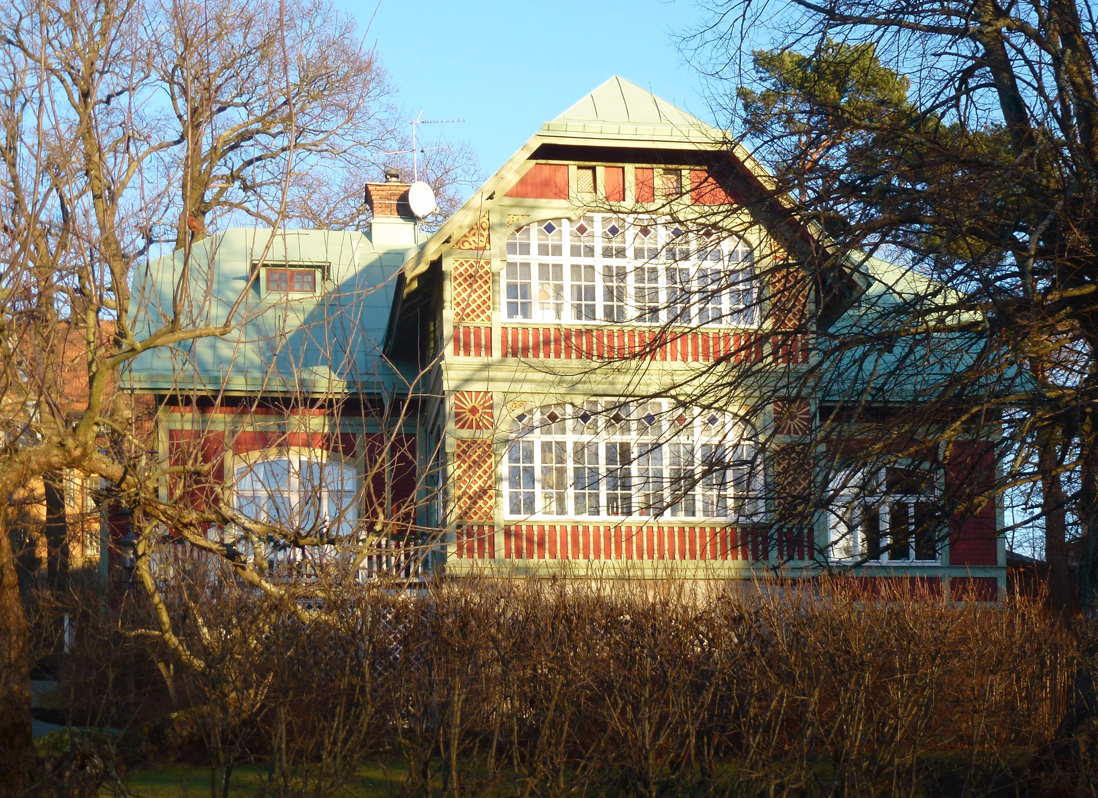 Villa Ransäter, Skandiavägen 10, Djursholm, arkitekt Erik Lundroth. Byggherre var Emil Egnell, en av Djursholms AB:s grundare.